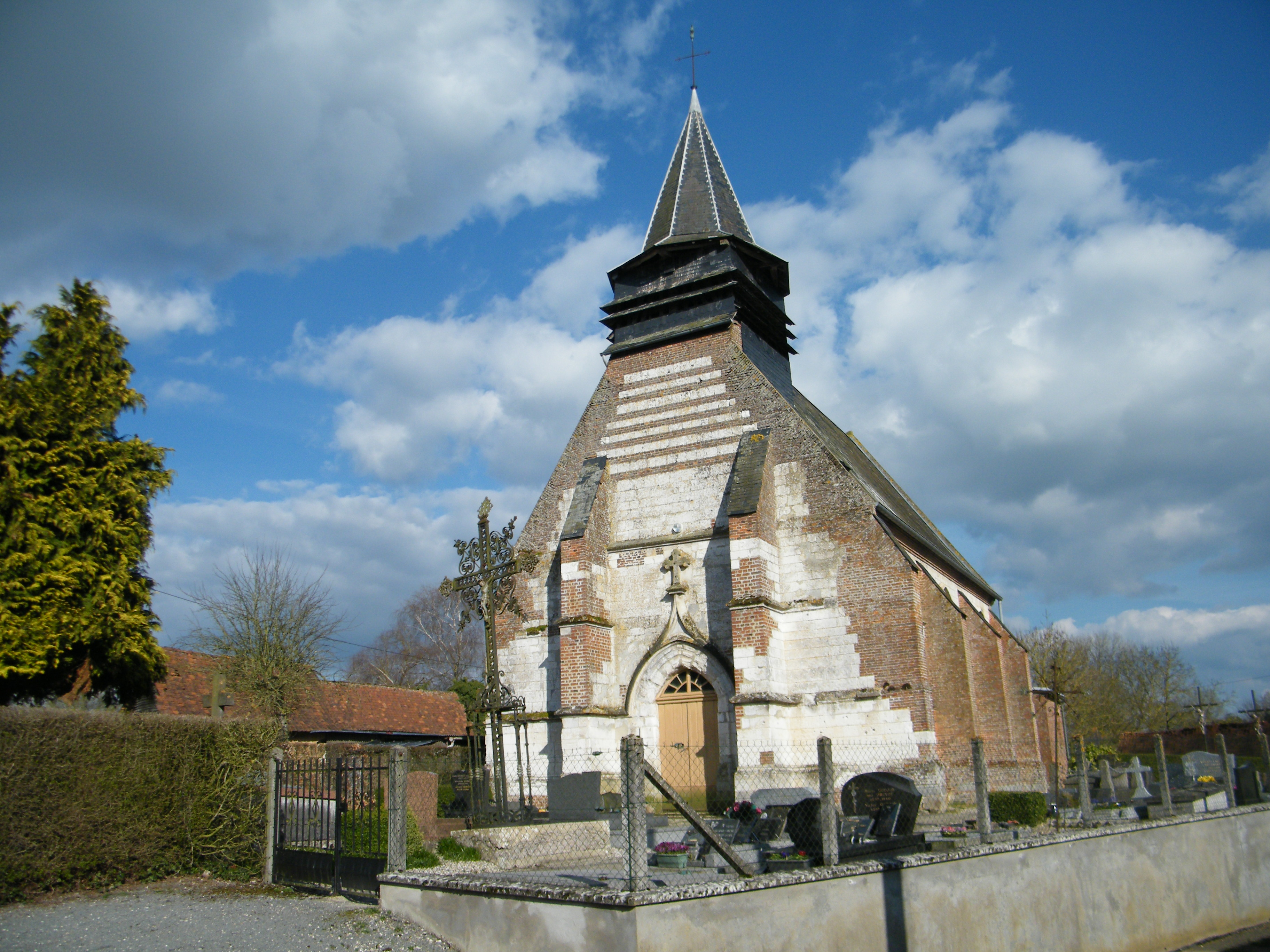 L'église côté sud.